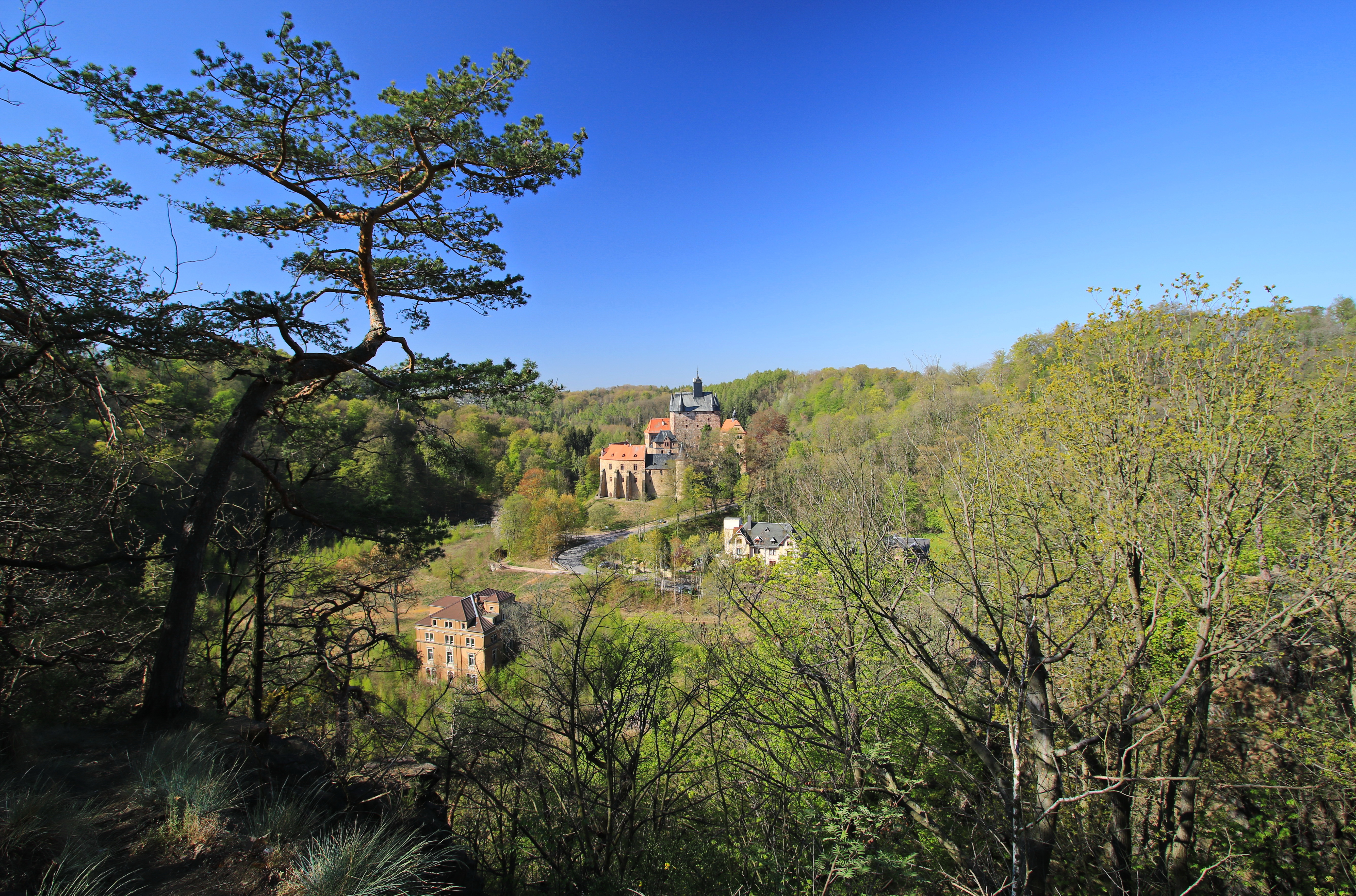 Landschaftsschutzgebiet in Sachsen. Blick vom Aussichtspunkt auf Burg Kriebstein.